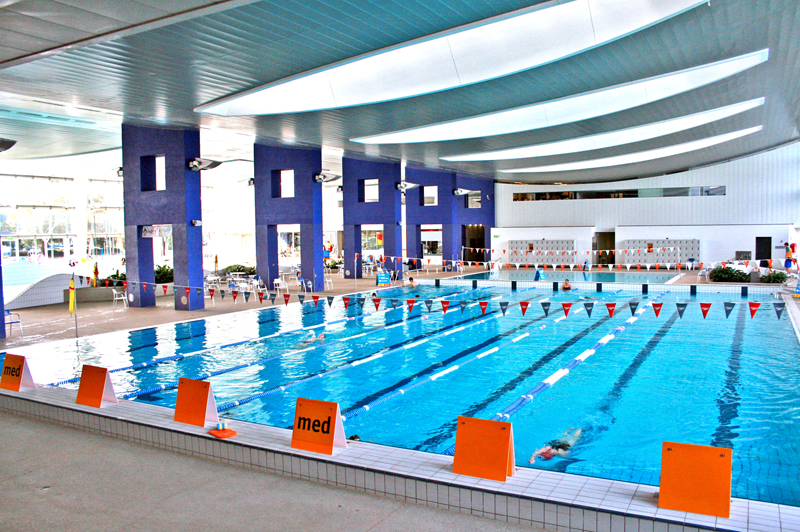 Indoor Swimming Pool